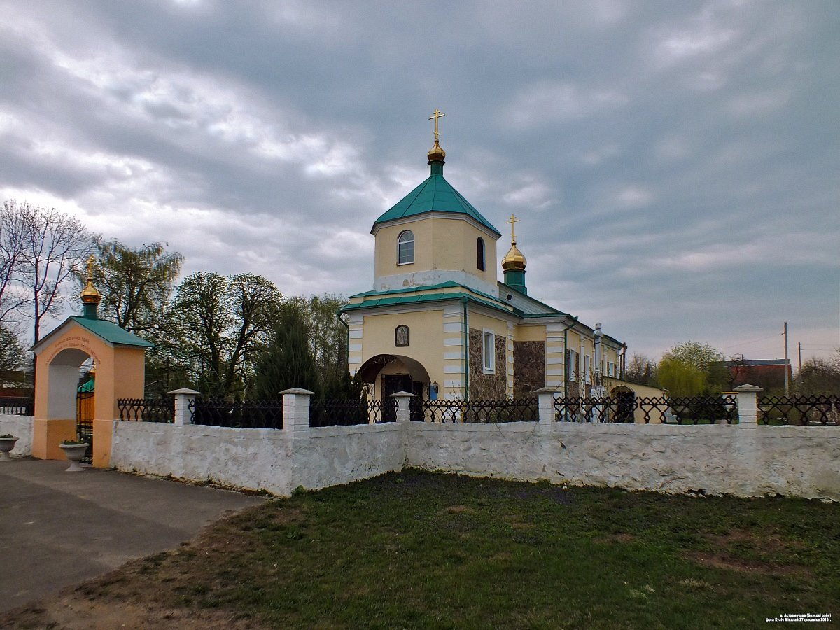 Астрамечава. Свята-Міхайлаўская царква